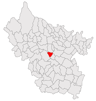 Categorie:Hărţi ale judeţului Buzău